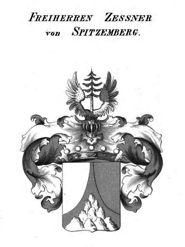 Wappen Zessner von Spitzemberg - Tyroff AT.jpg